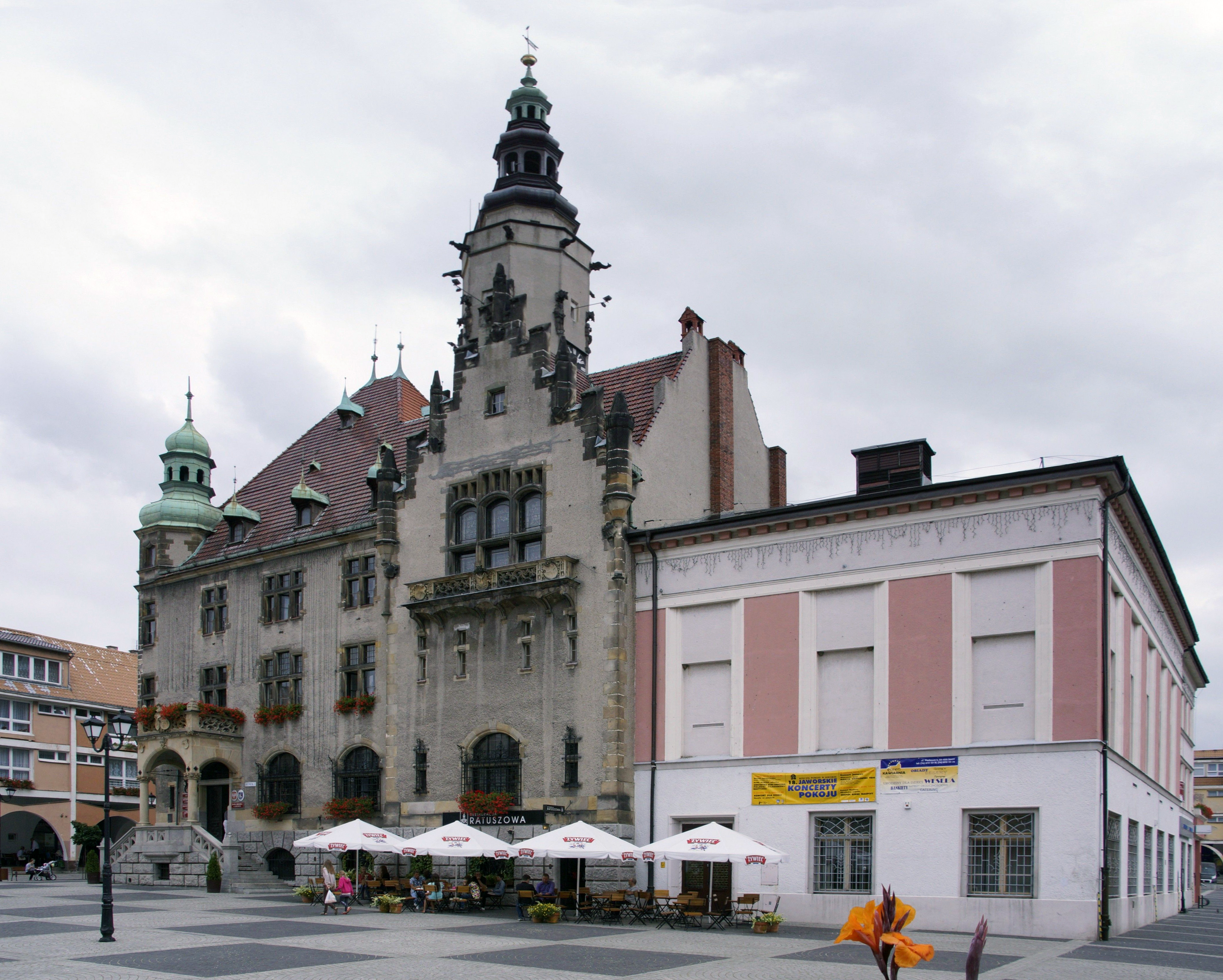 Jawor, Rynek - od lewej: - Ratusz - Teatr miejski, XVIII, 1874, 1925 (zabytek nr A/2953/1020/L)